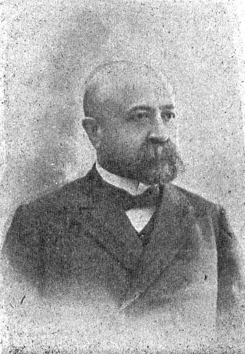 Евгений Михайлович Гаршин (15 августа (27 августа) 1860, Бахмутский уезд, Екатеринославская губ. — 1931, Ленинград) — русский педагог, литератор, критик, общественный деятель, издатель. Брат писателя В. М. Гаршина.